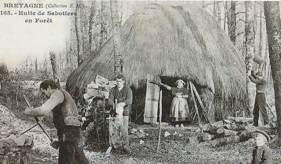 Bretagne : hutte de sabotiers en forêt (carte postale Emile Hamonic, vers 1900)